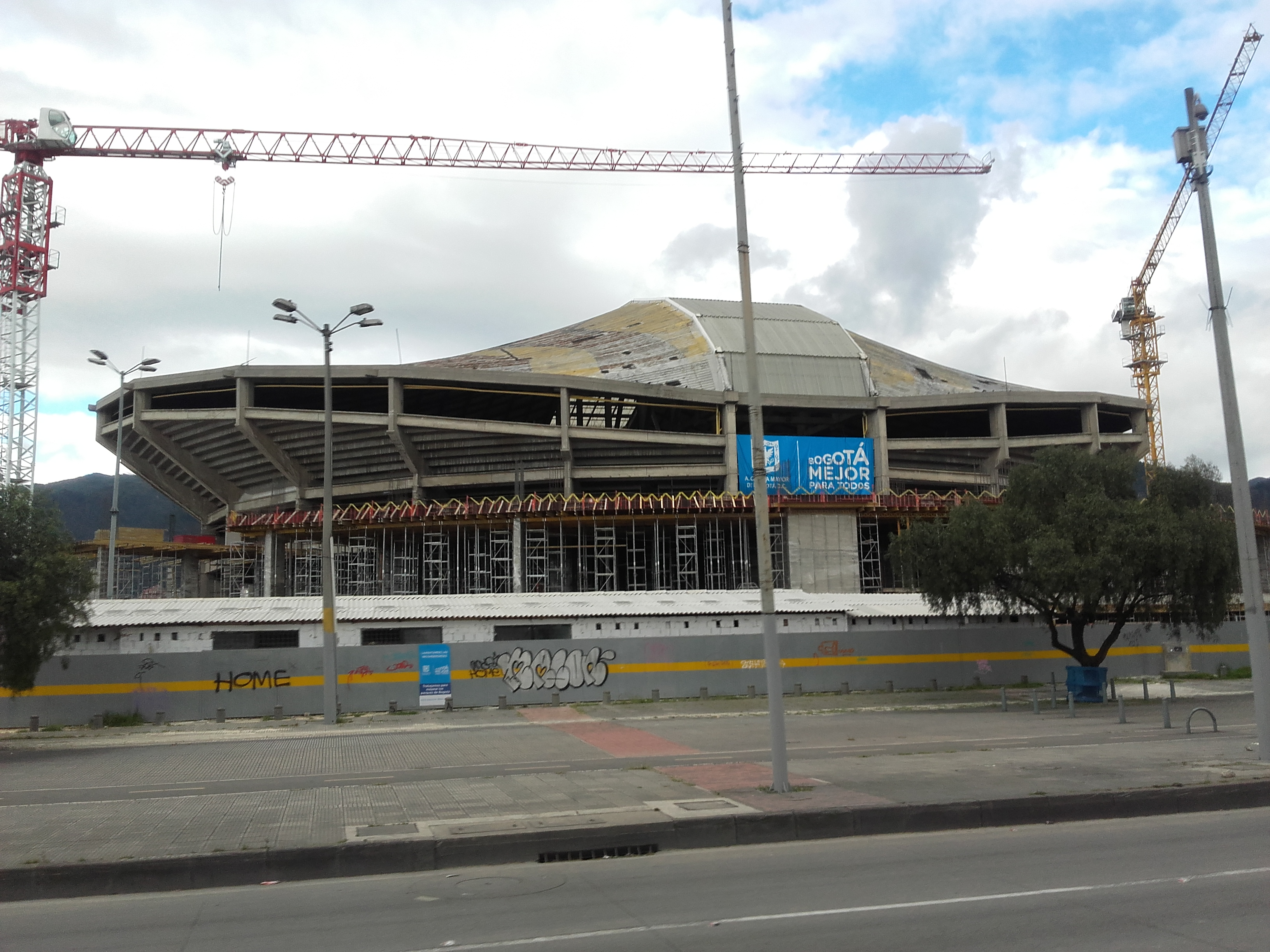 kfkffkfkfkfgkjkflflfmmf